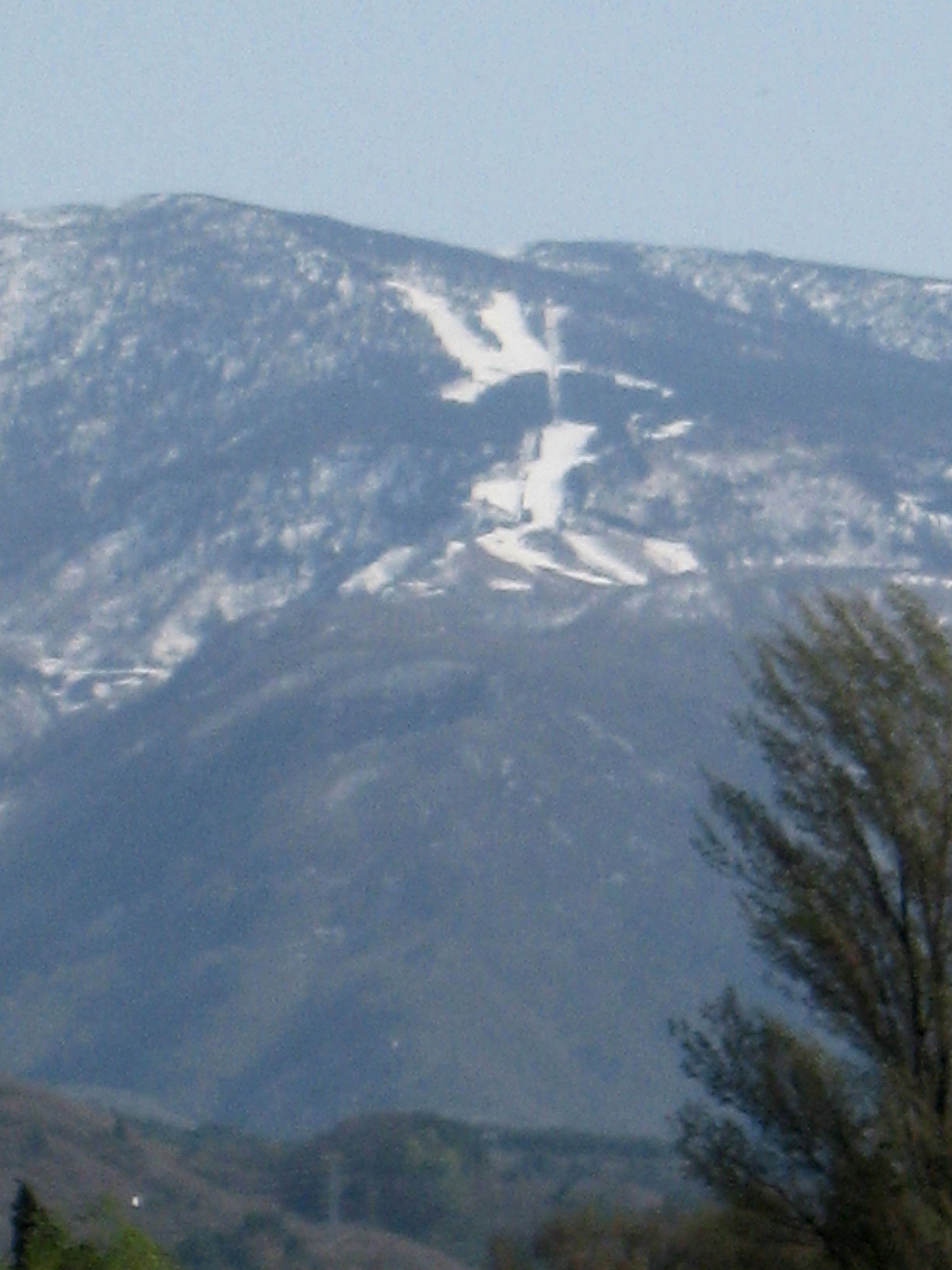 吾妻山腹の「白馬の騎士」。投稿者撮影。